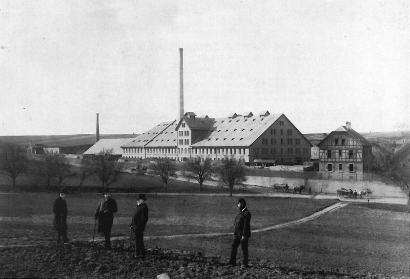 Ansicht der Ziegelei Böckingen bei Heilbronn, 1882